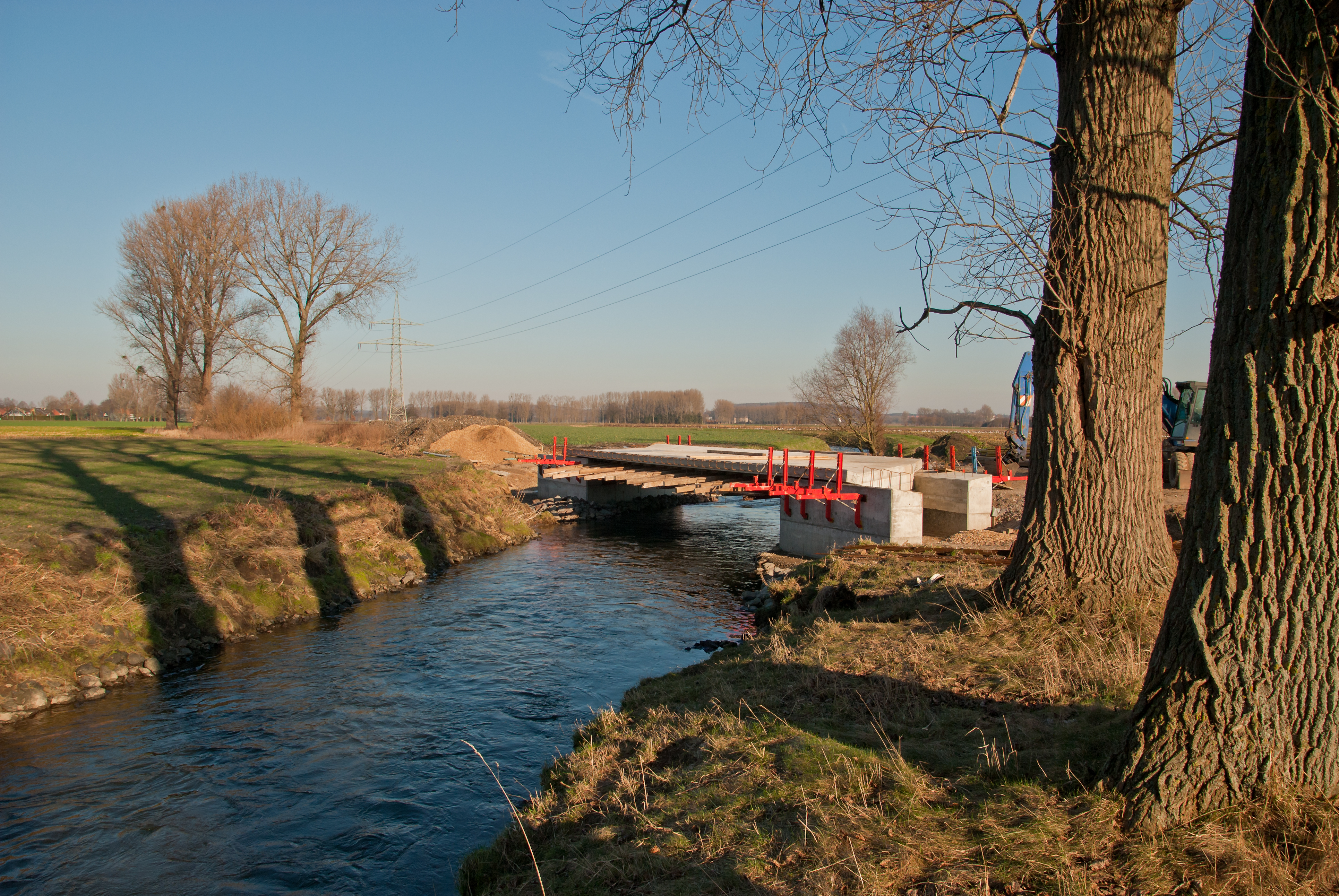 Die im Neubau befindliche Brücke der Heinsberger Bahn über die Wurm bei Randerath